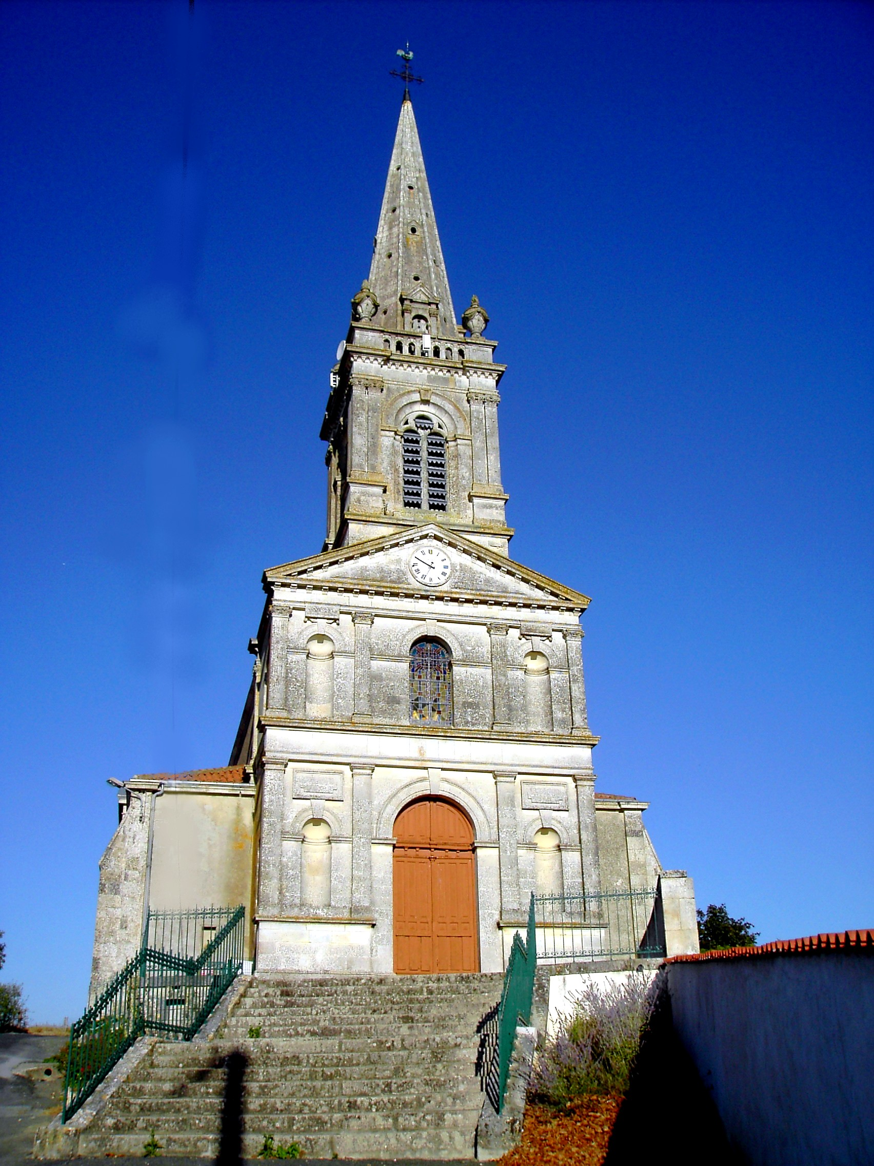 Eglise du XIXème construite Architectes: V.CLAIR et F.LEVECQUE